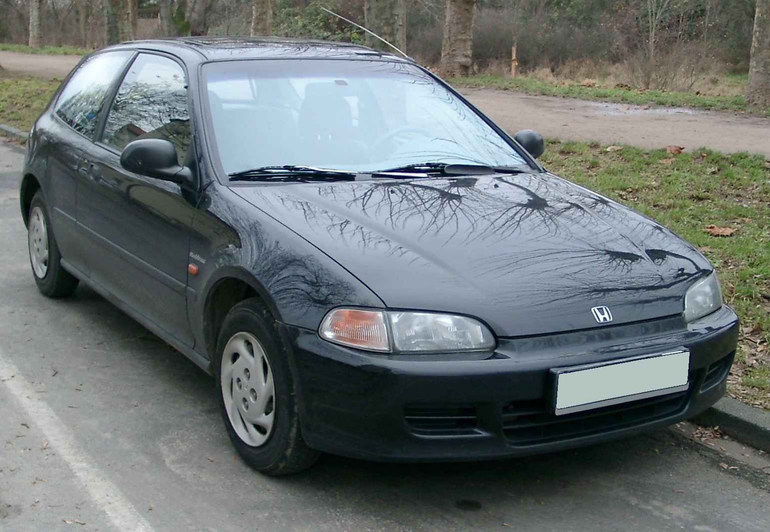 Honda Civic, 5. Generation